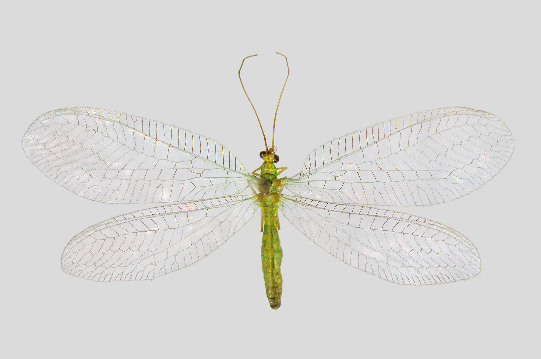 Chrysotropia ciliata